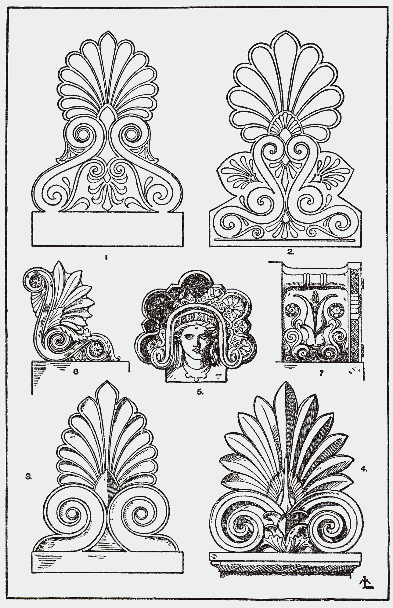 Orna105-Stirnziege